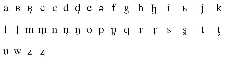 Ненецкий алфавит на латинской основе. 1931 год.